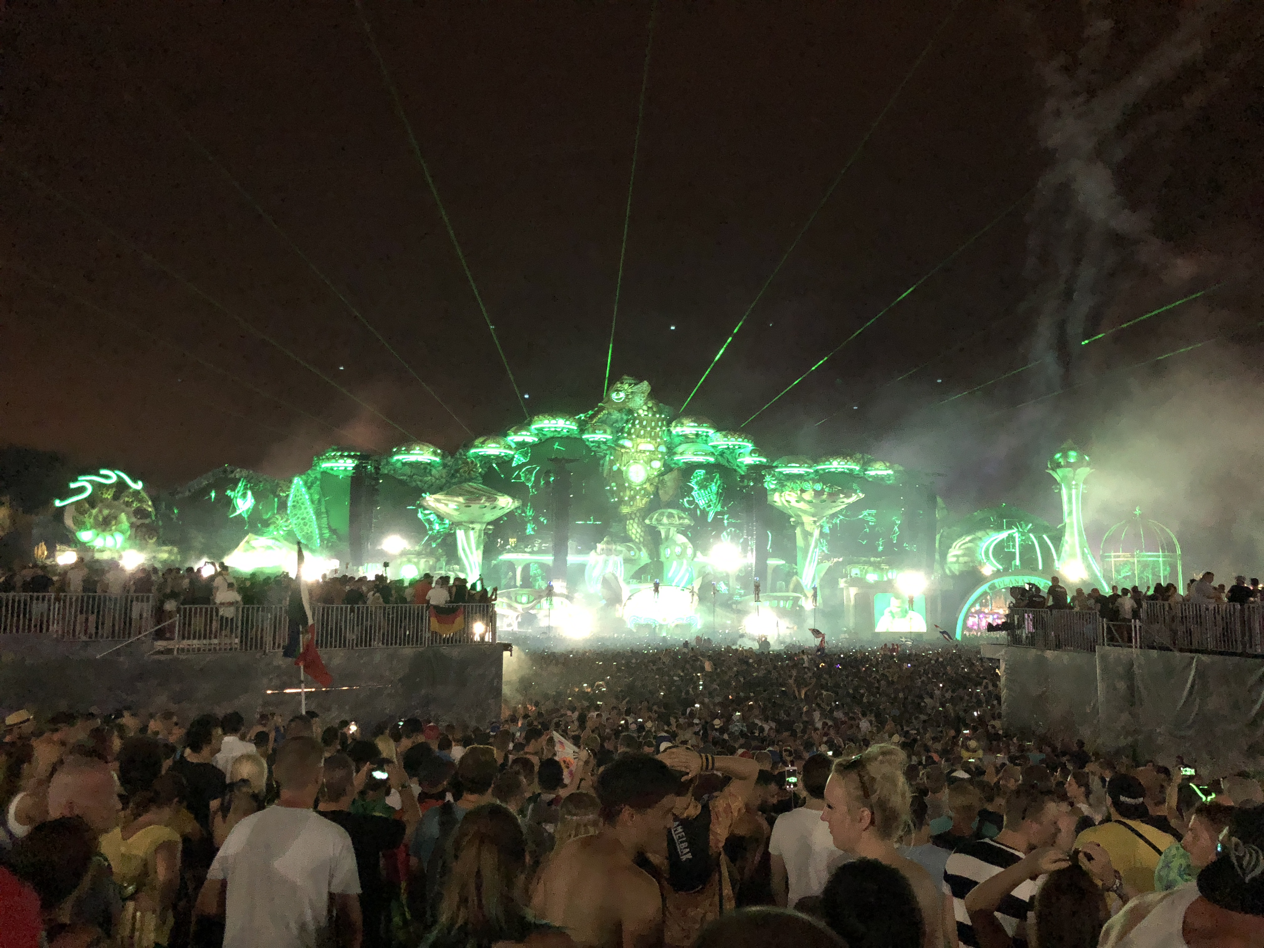 Mainstage na festivalu Tomorrowland v roce 2018